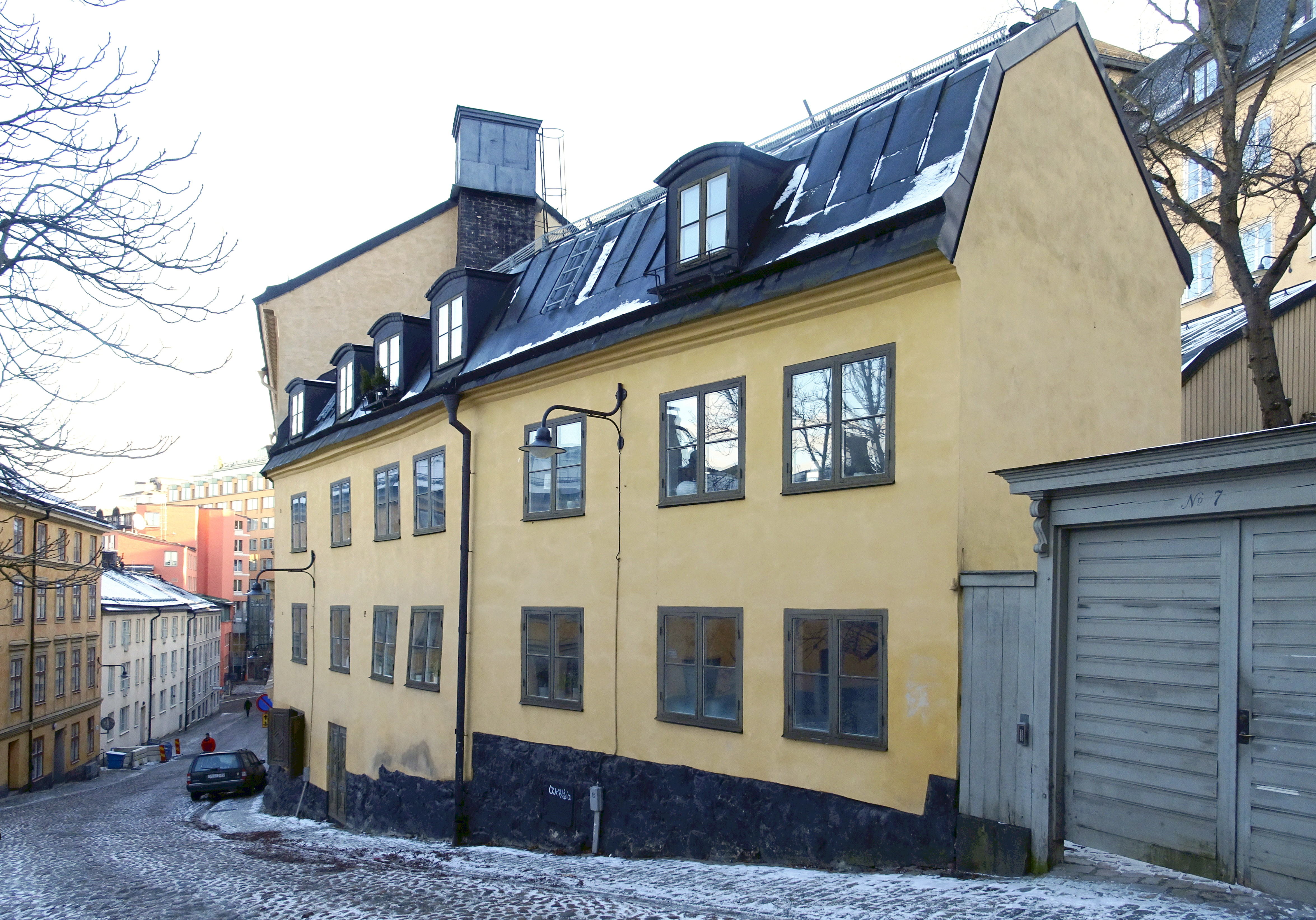 Kvarteret Trappan på Mariaberget, sett från Bastugatan